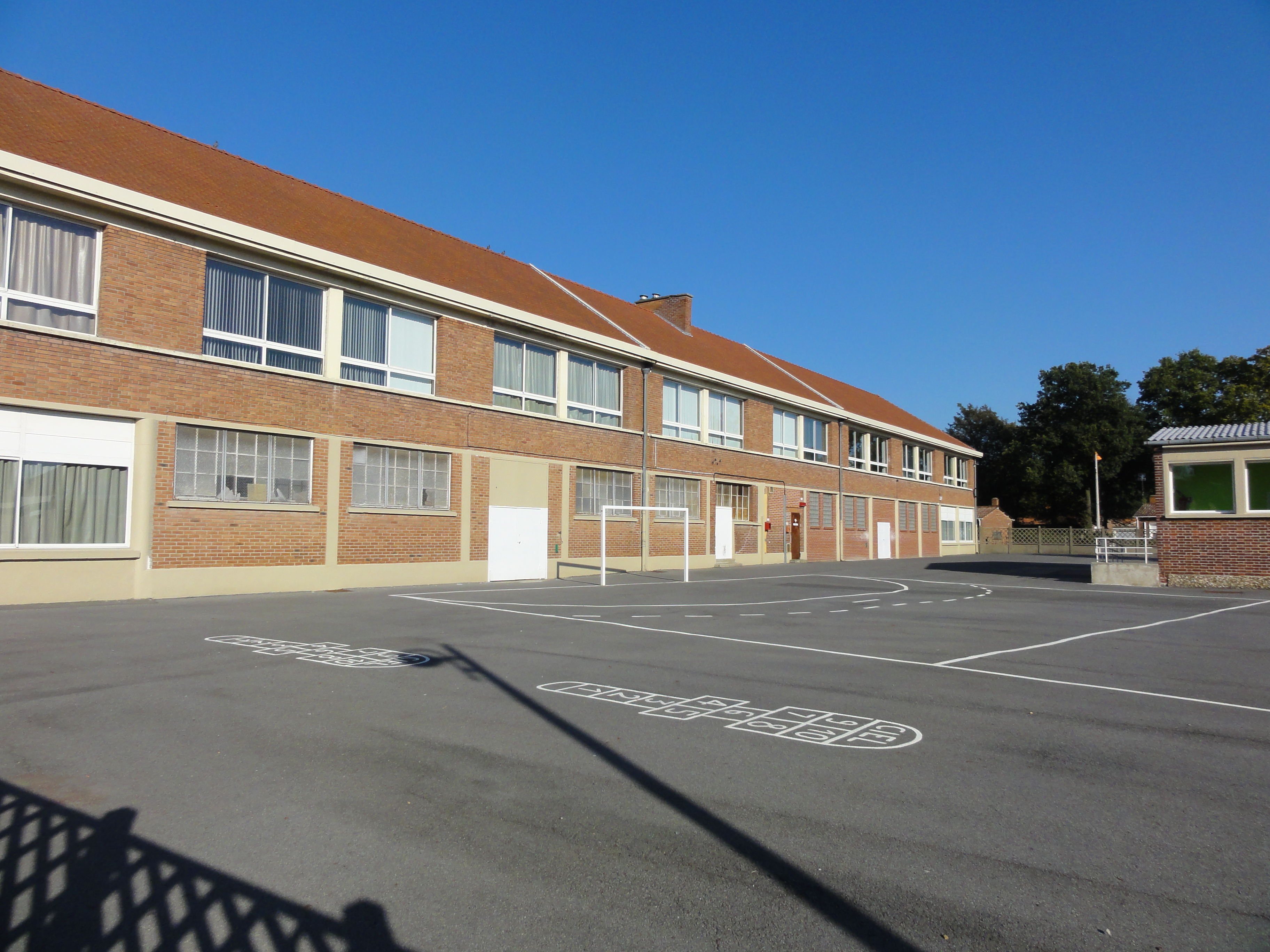 Écoles des cités de la Fosse n° 2 de la Compagnie des mines d'Ostricourt, Libercourt, Pas-de-Calais, Nord-Pas-de-Calais, France.